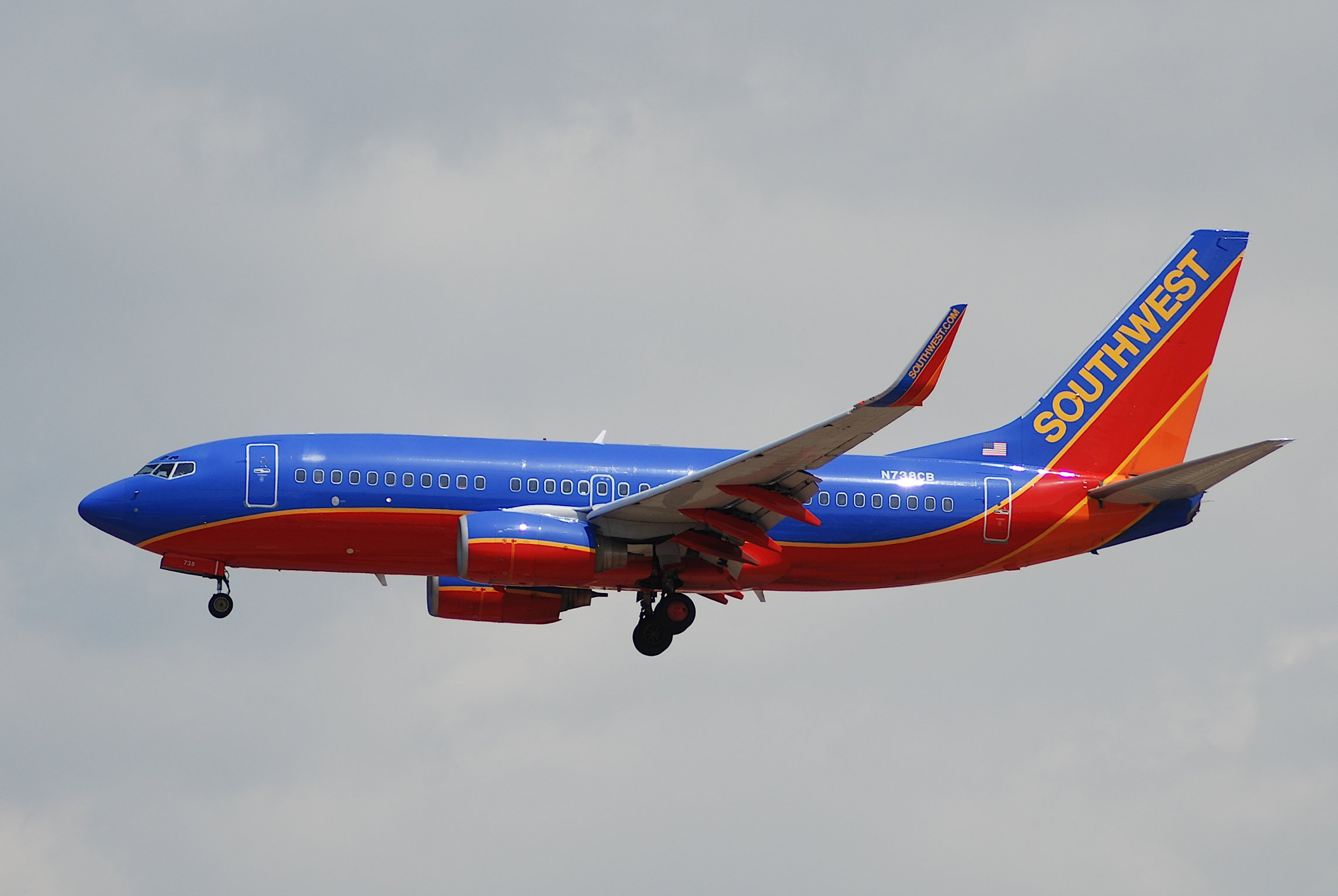 Southwest Airlines Boeing 737-700; N738CB@LAX;21.04.2007/466kc